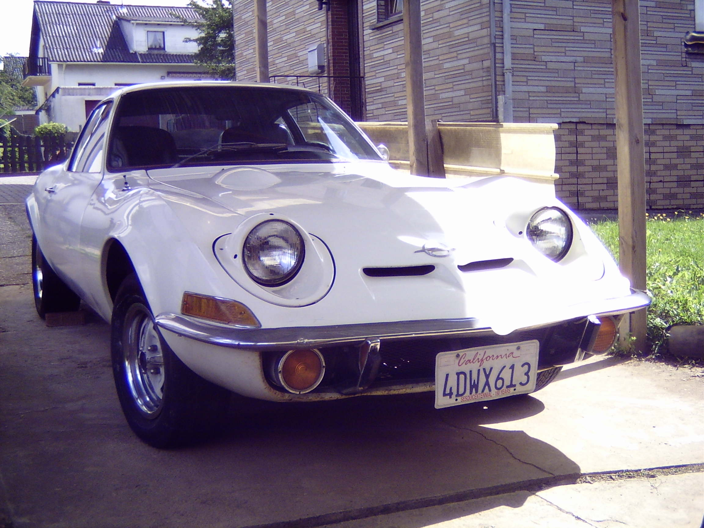 Opel GT A-L 1900